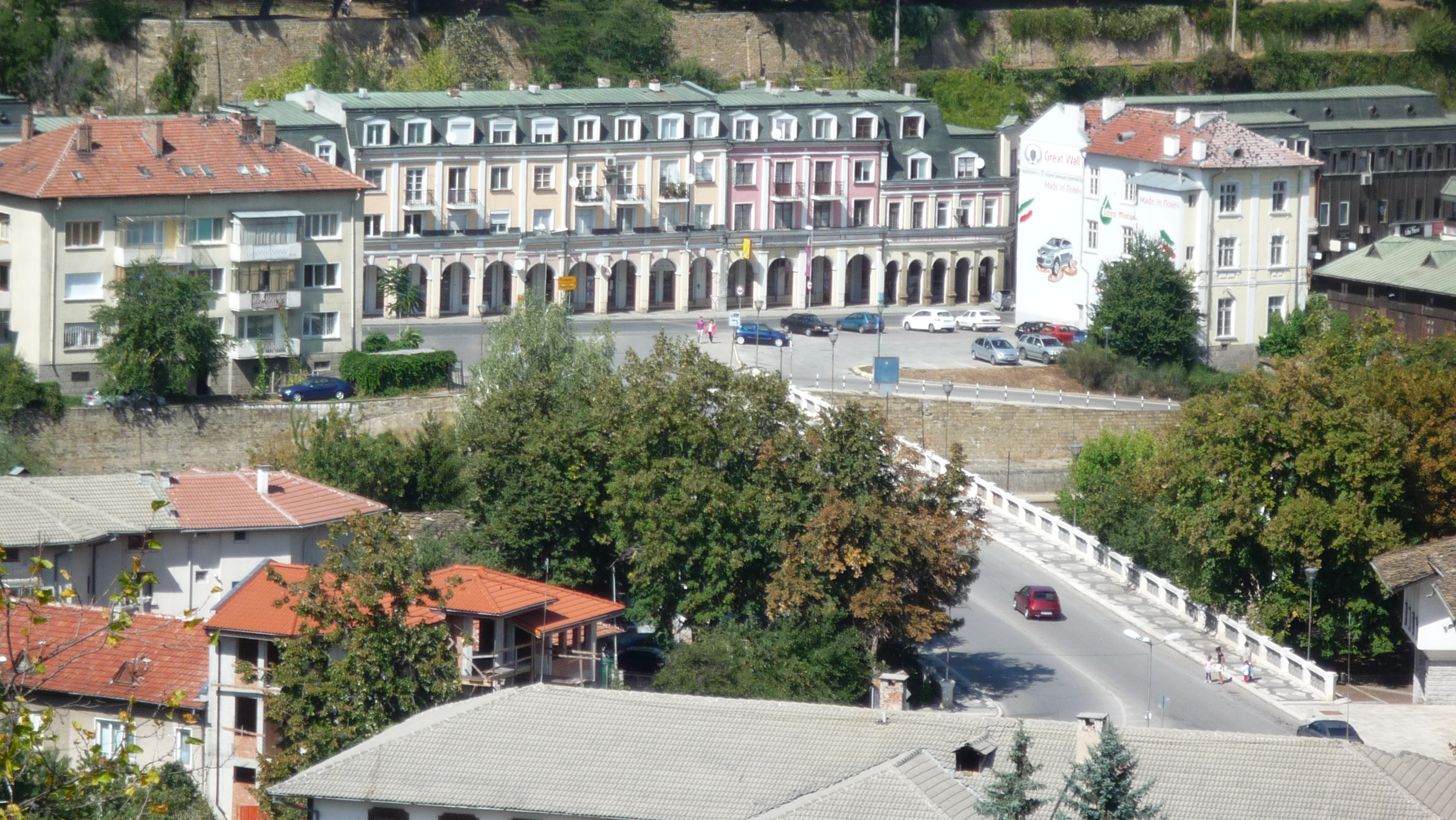 Транспортният мост и Бароковите къщи от крепостта